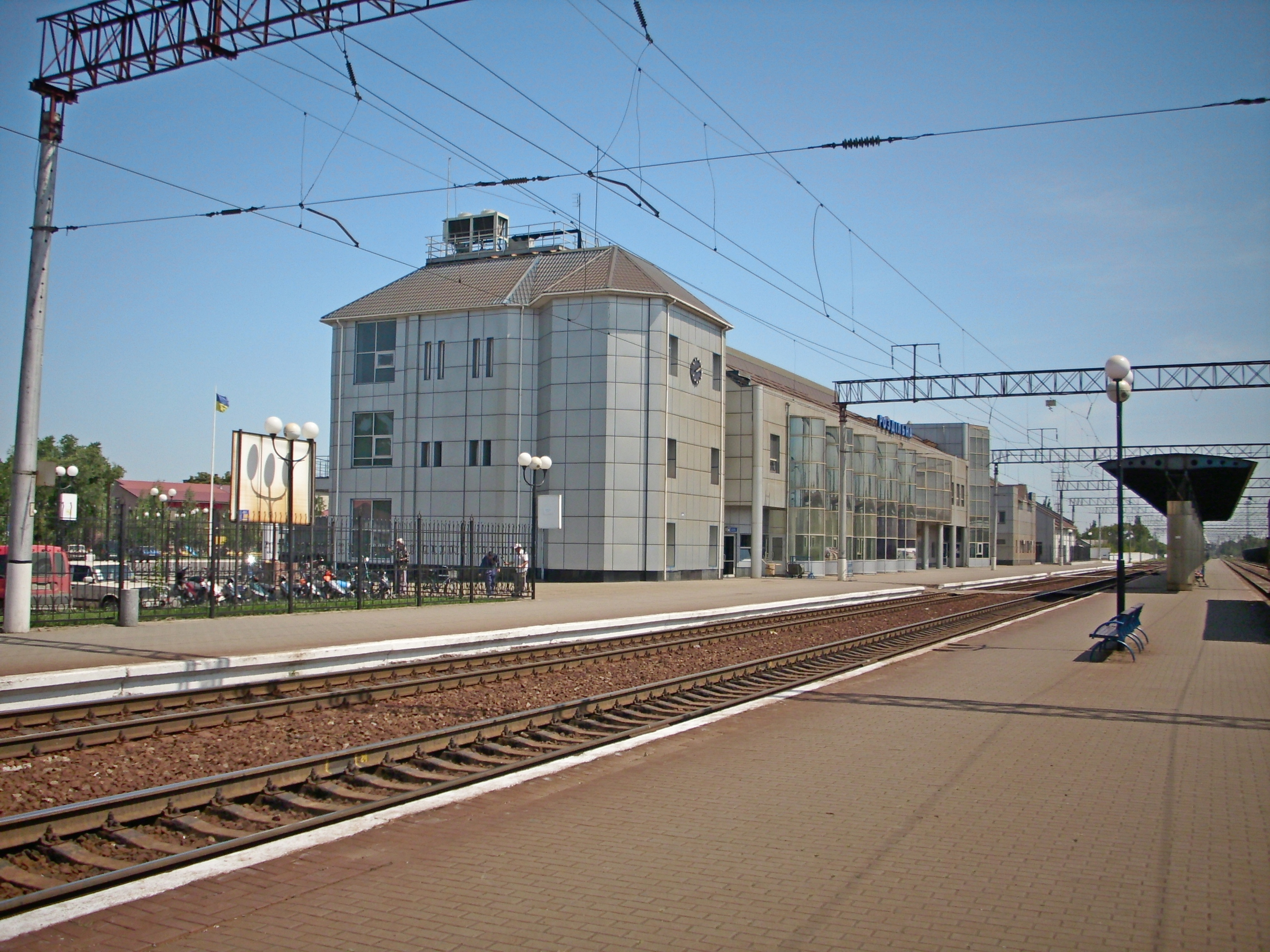 Станція Роздільна